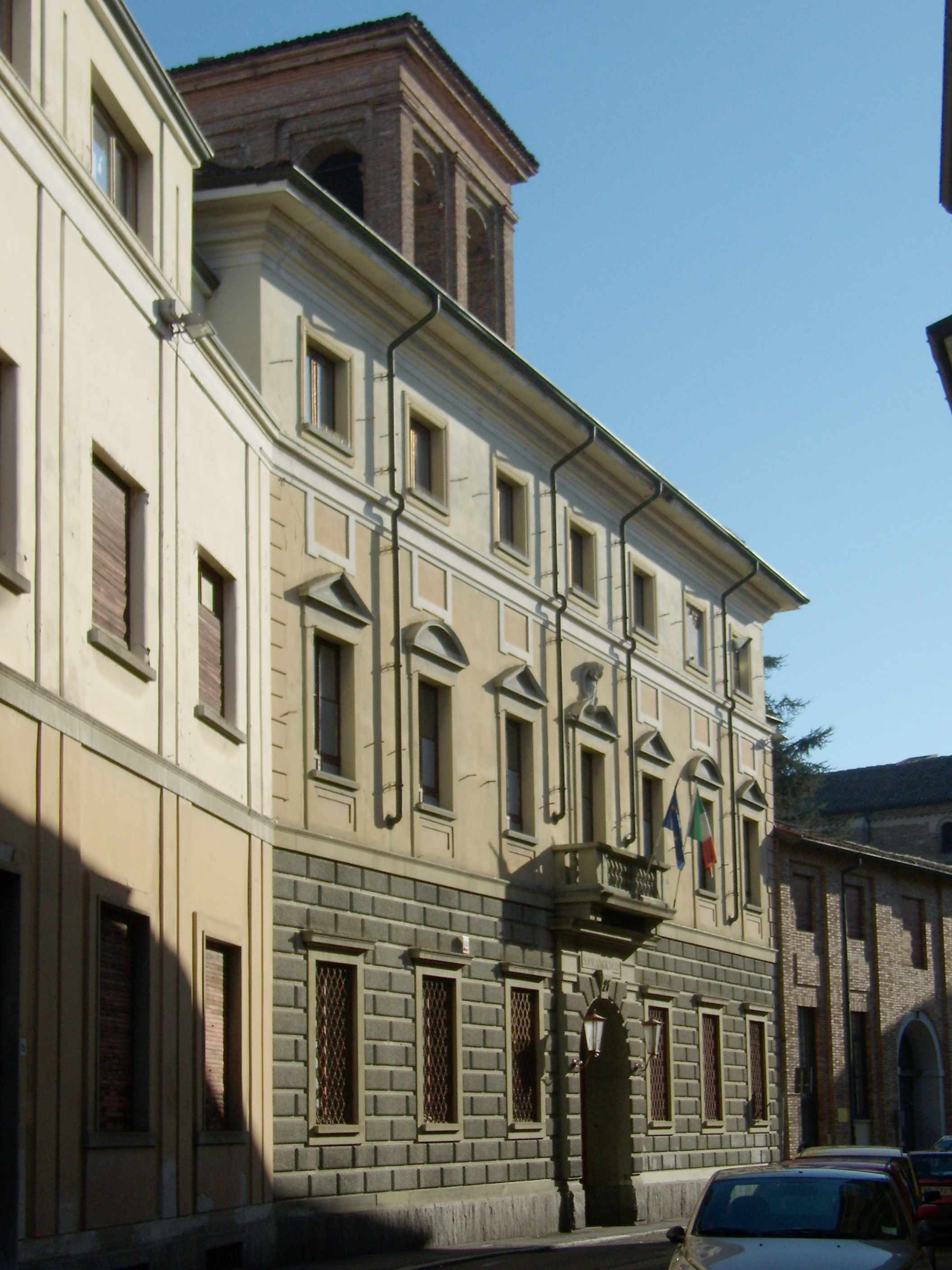 Il collegio San Francesco a Lodi